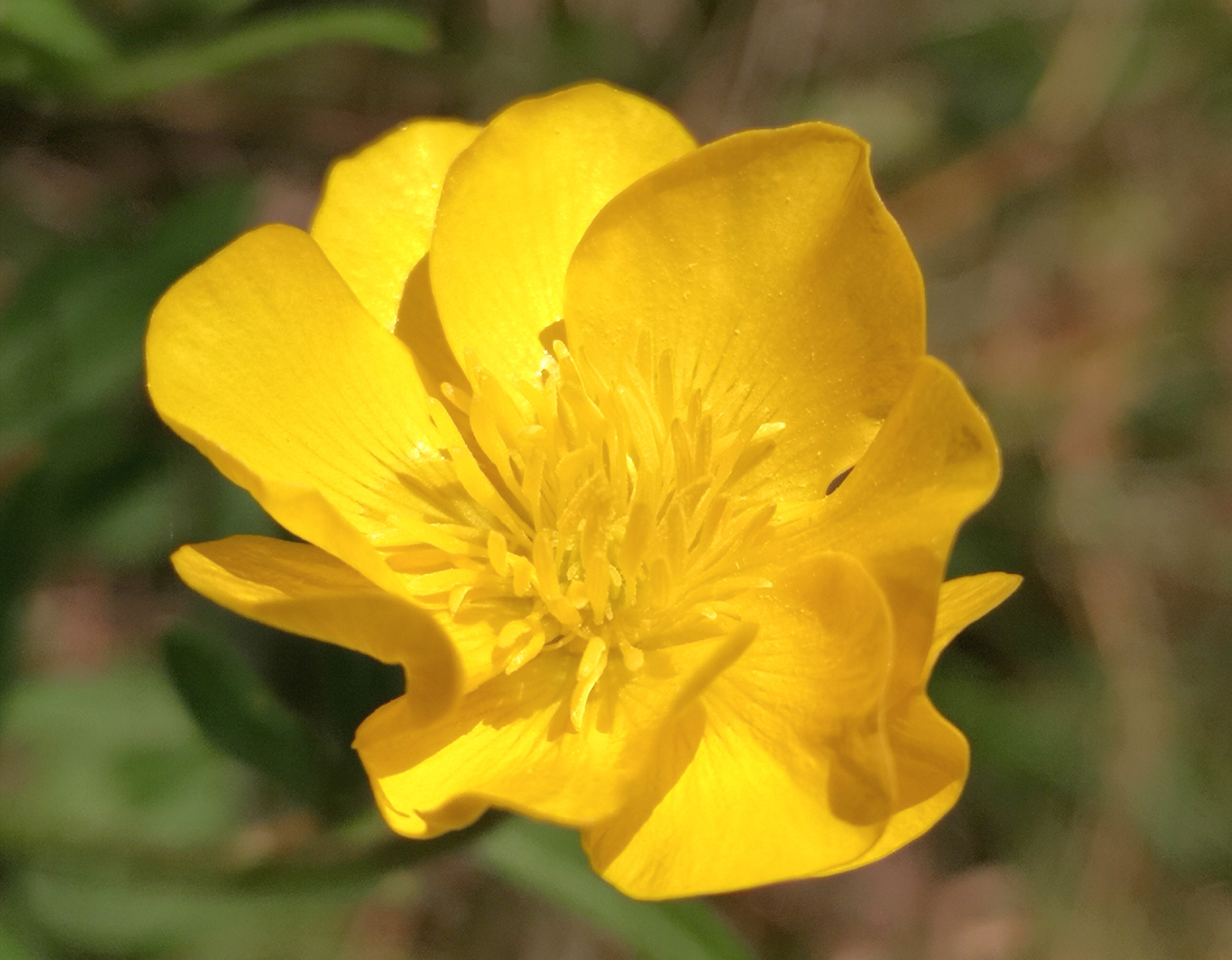 Ranunculus bulbosus - Ranunculaceae